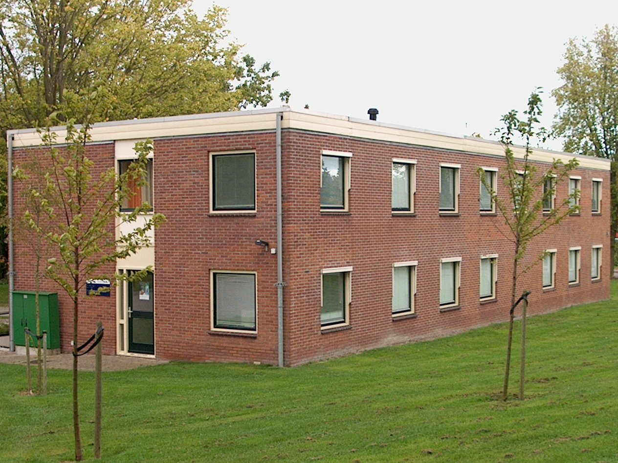 Zusterhuis van toenmalig Sint Jans Gasthuis, studio van Ziekenomroep ROVOZ, Hoorn (Noord-Holland)